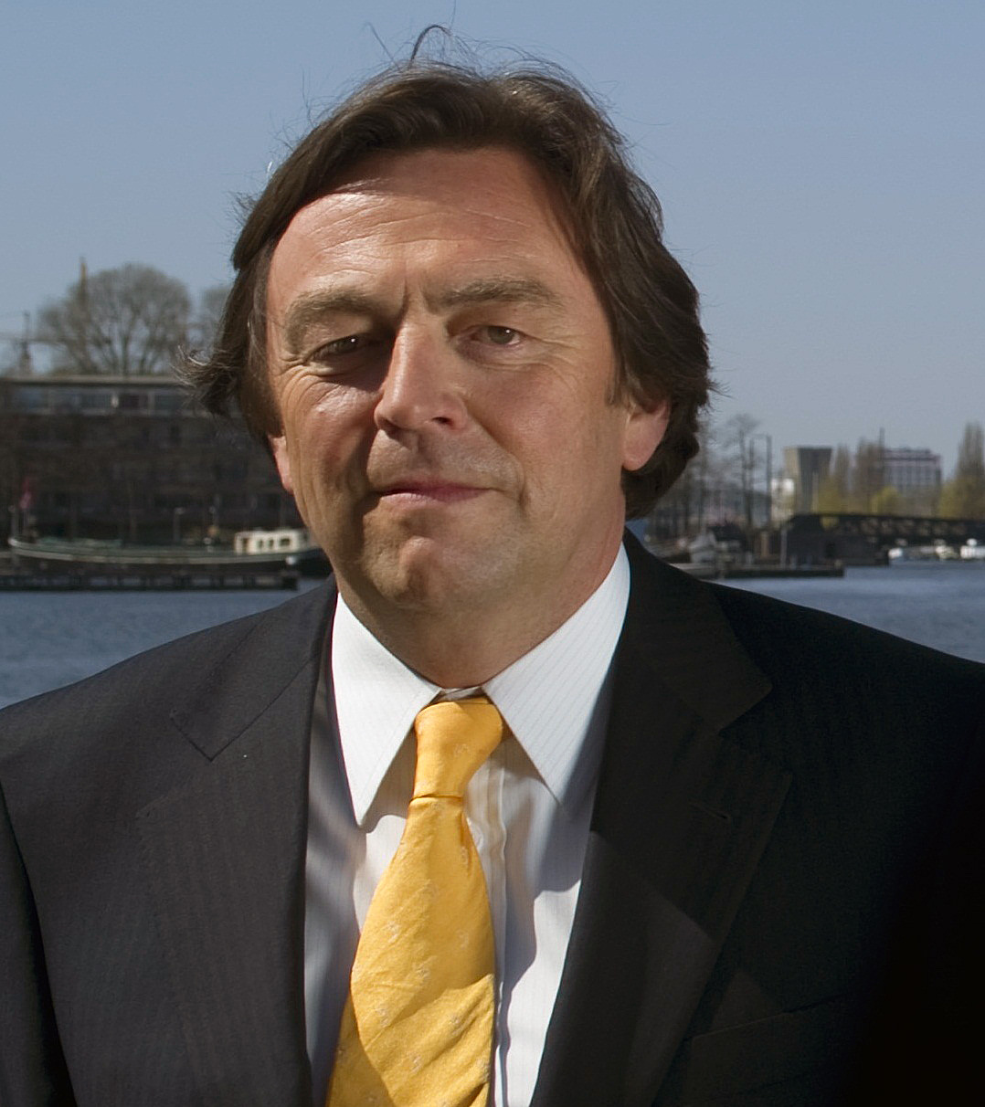 Hans Wijers. Minister van Economische Zaken (1994-1998)